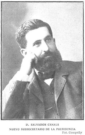 Retrato del político Salvador Canals, obra de Manuel Compañy, recogido en la revista española Actualidades.